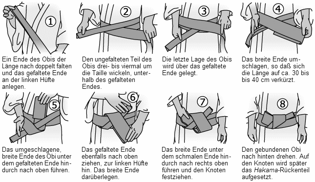 eine gängige Form der Obi-Bindung beim Iaido